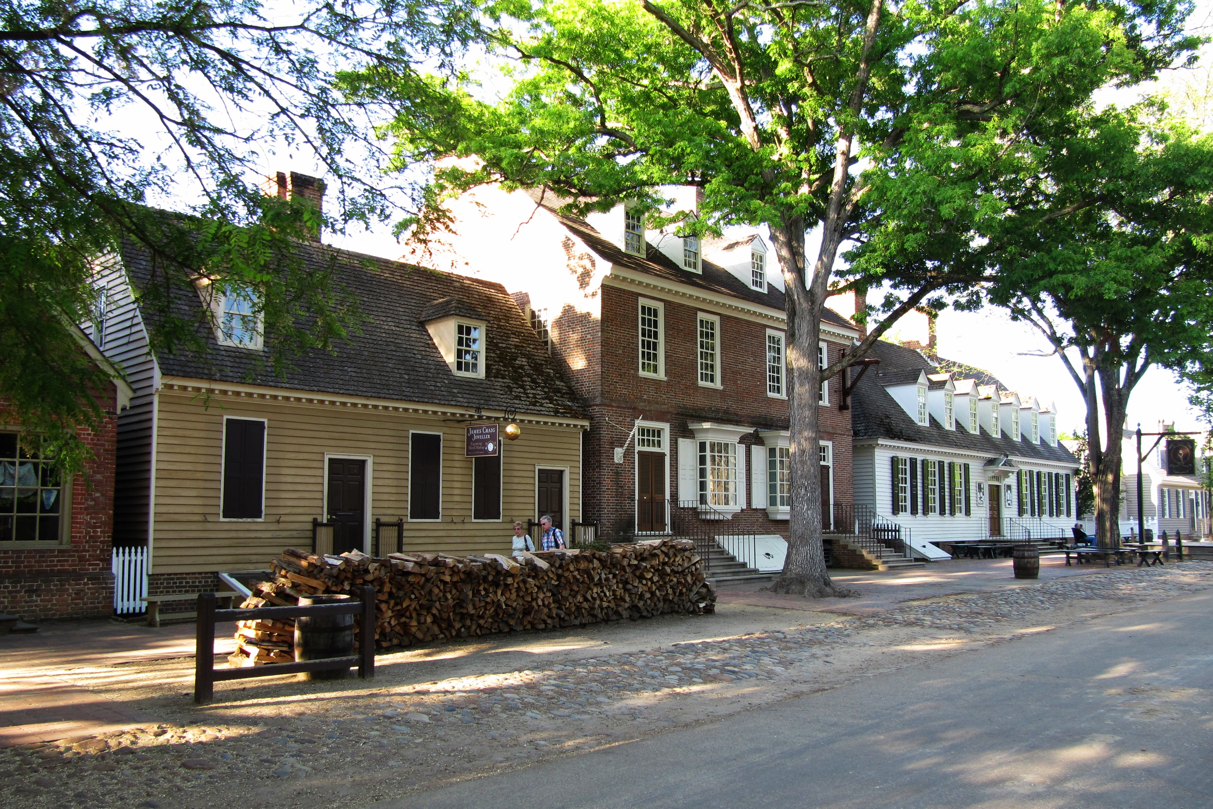 Die "Duke of Gloucester Street" in Colonial Williamsburg